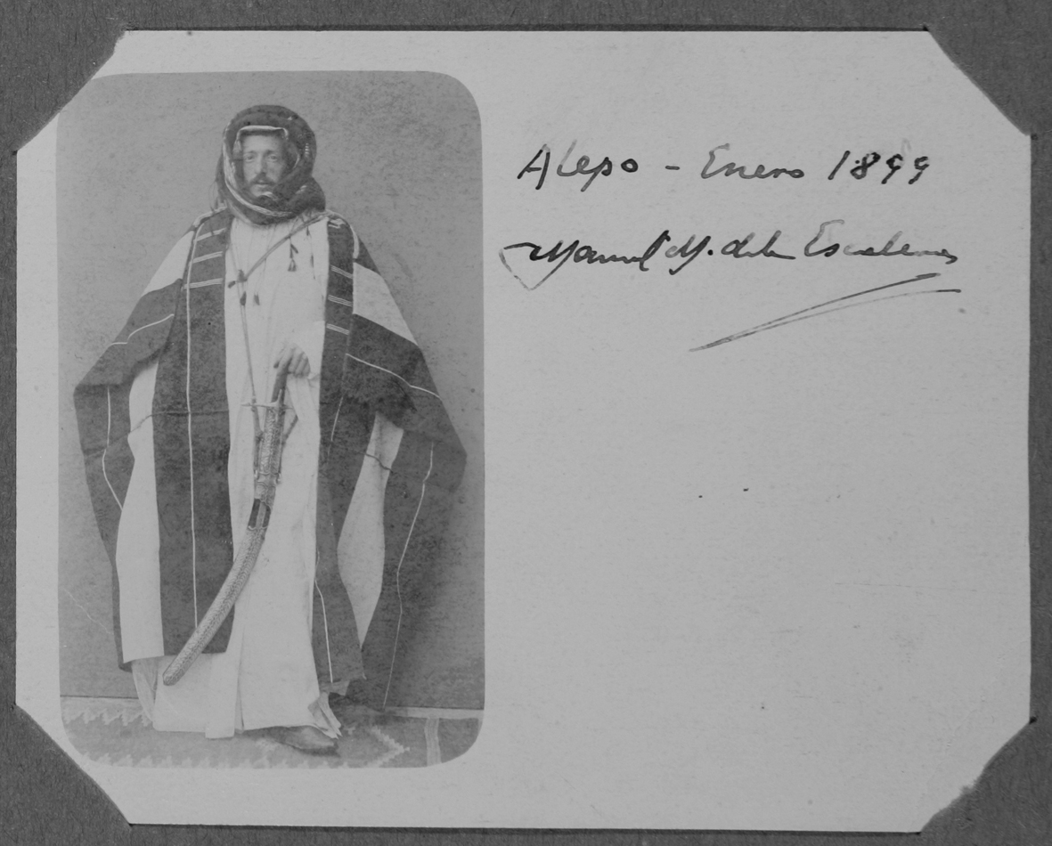 Retrato de Manuel Martínez de la Escalera, realizado en Alepo en 1899, en el curso de su gran viaje a Irán. Archivo MNCN. Sign. Album de Entomología IMG 19/p. 12.